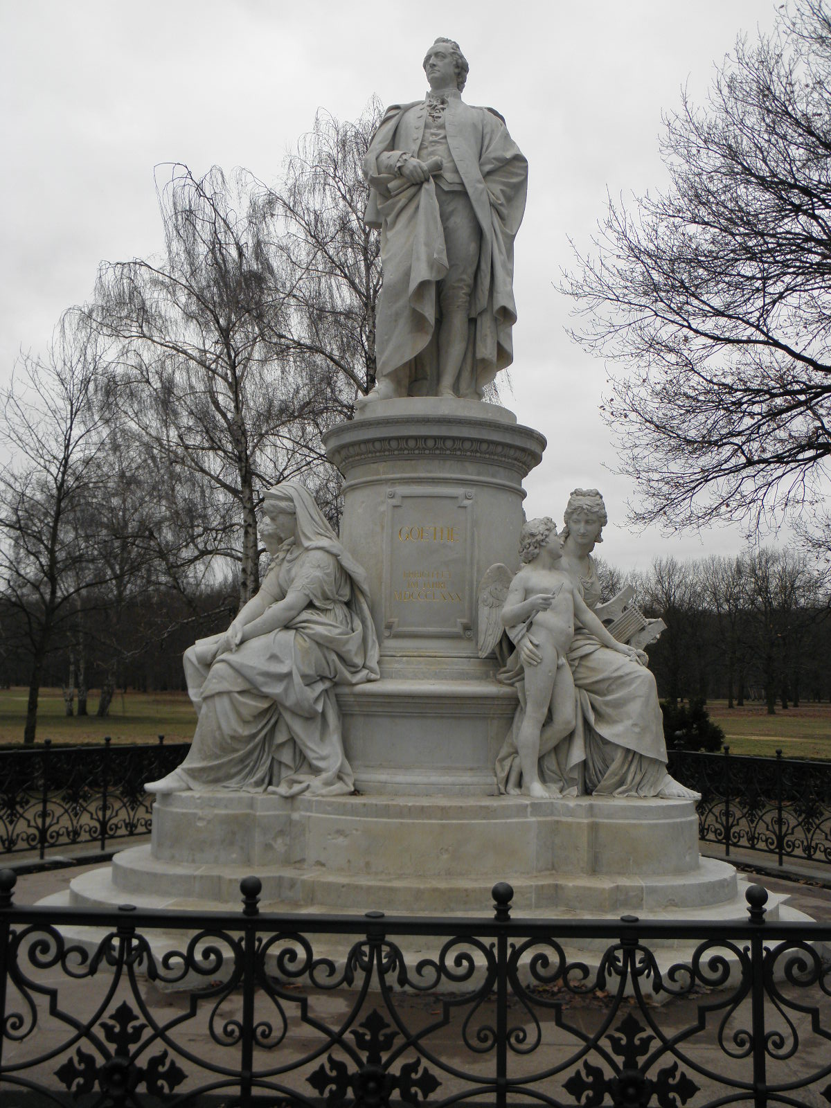 Берлін. Пам'ятник Йоганну Вольфгангу фон Ґете